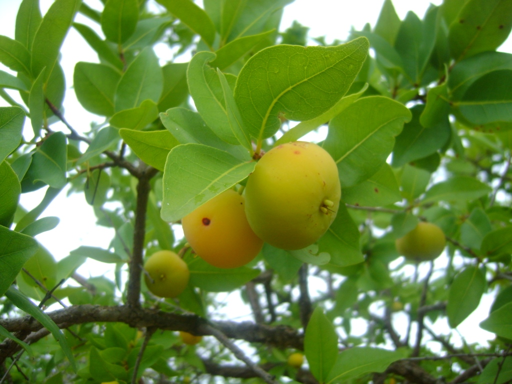 Fruktoj de Eugenia dysenterica.